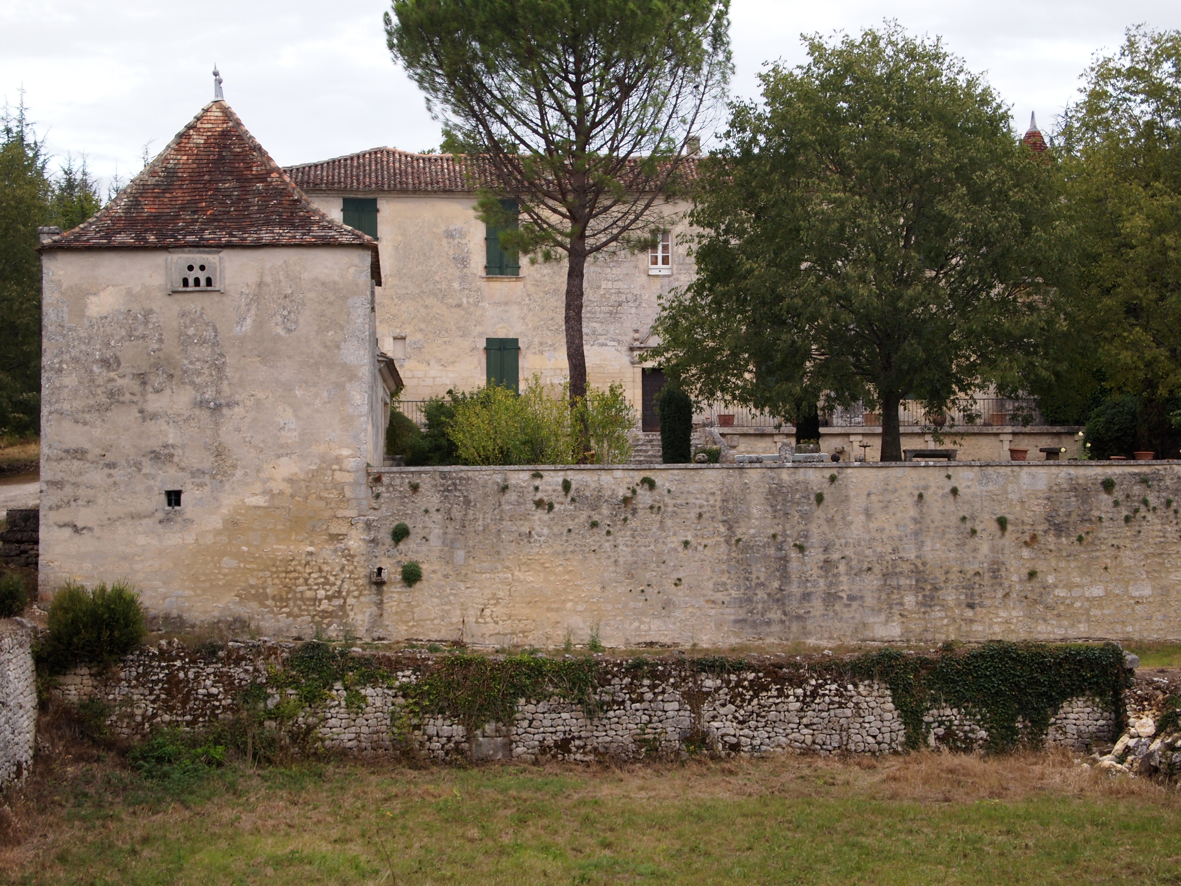 Château de la Foix (ou de la Foy), à Mouthiers-sur-Boëme en Charente (France) (inscrit, 1963)